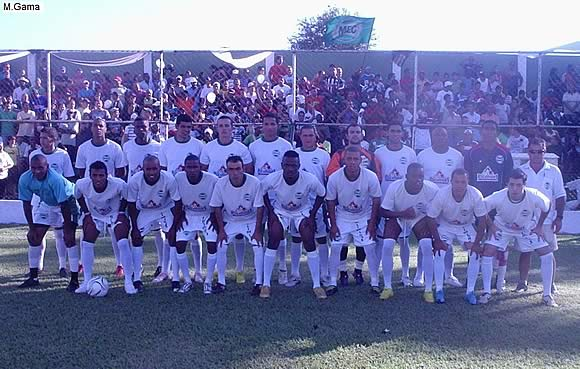 time do mec